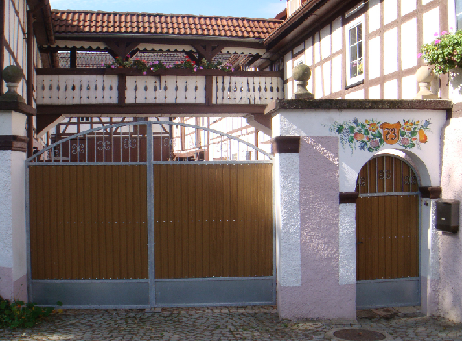 Bauernhof mit überdachtem Übergang in Remschütz